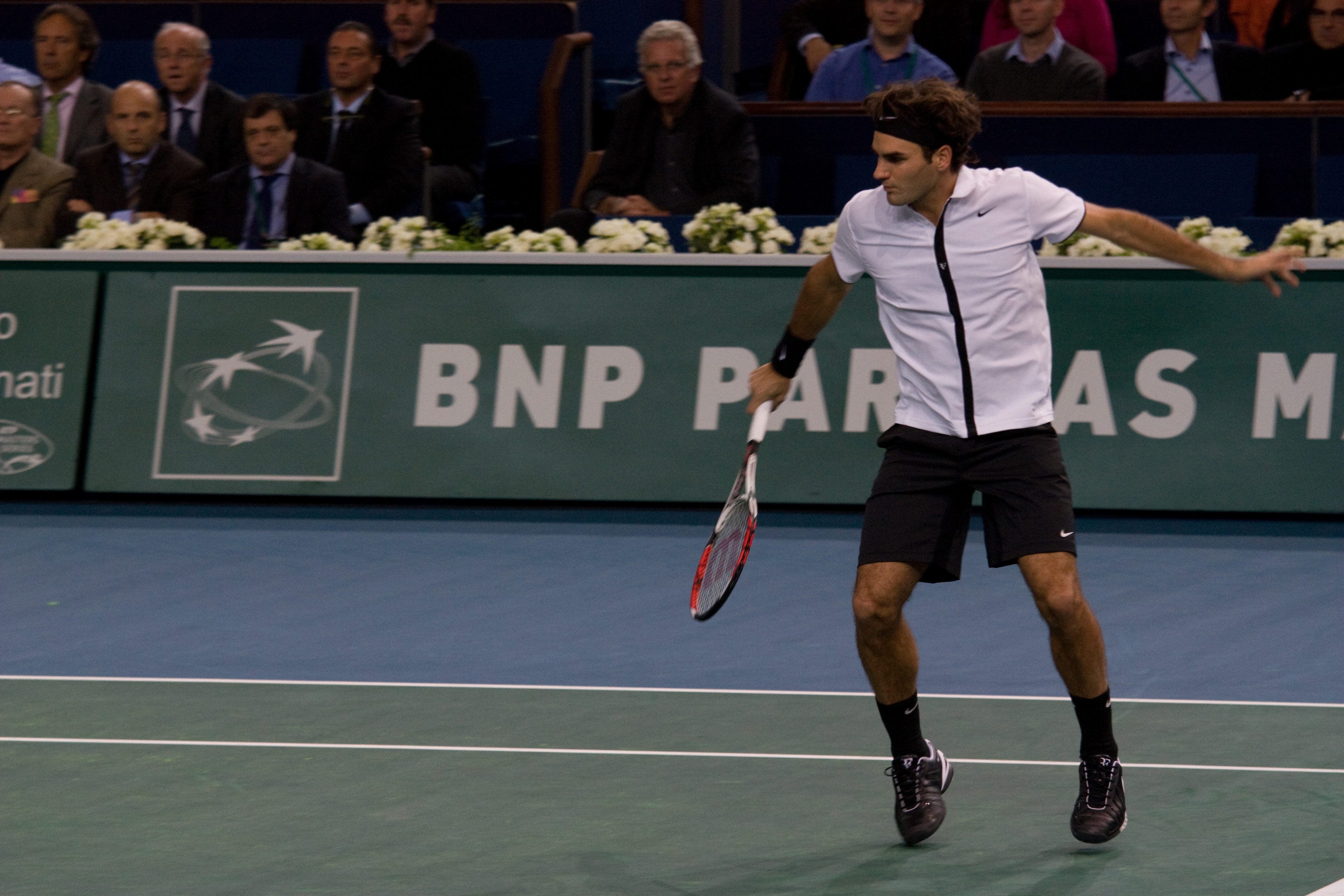 Roger Federer against Robin Soderling at the 2008 BNP Paribas Masters